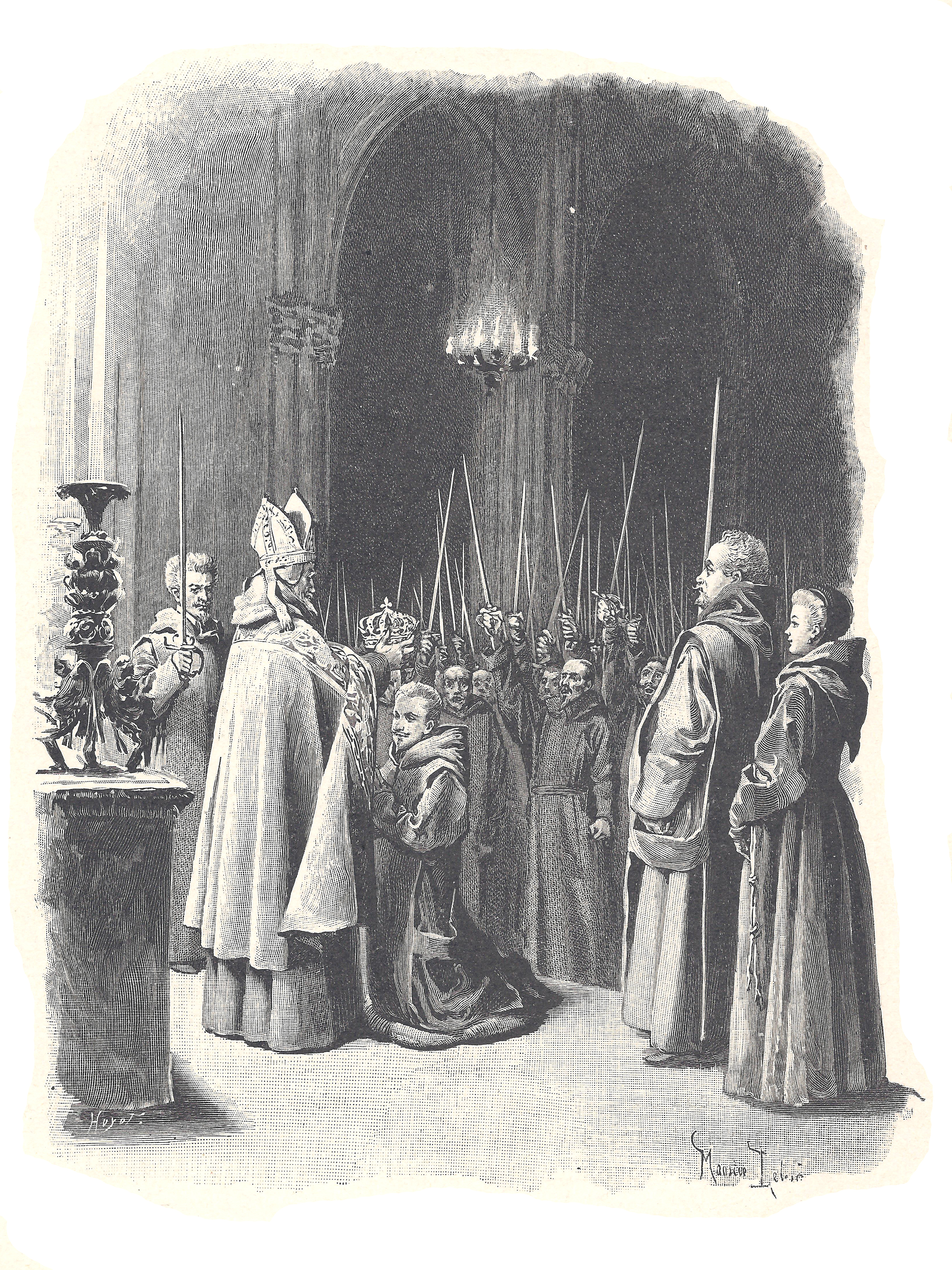 composition de Maurice Leloir et gravure sur bois de Jules Huyot se trouvant p. 270 : " Vive le roi François III ! "